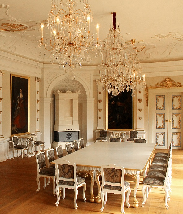 Festsaal des Neuen Palais' in Arnstadt nach der Restaurierung